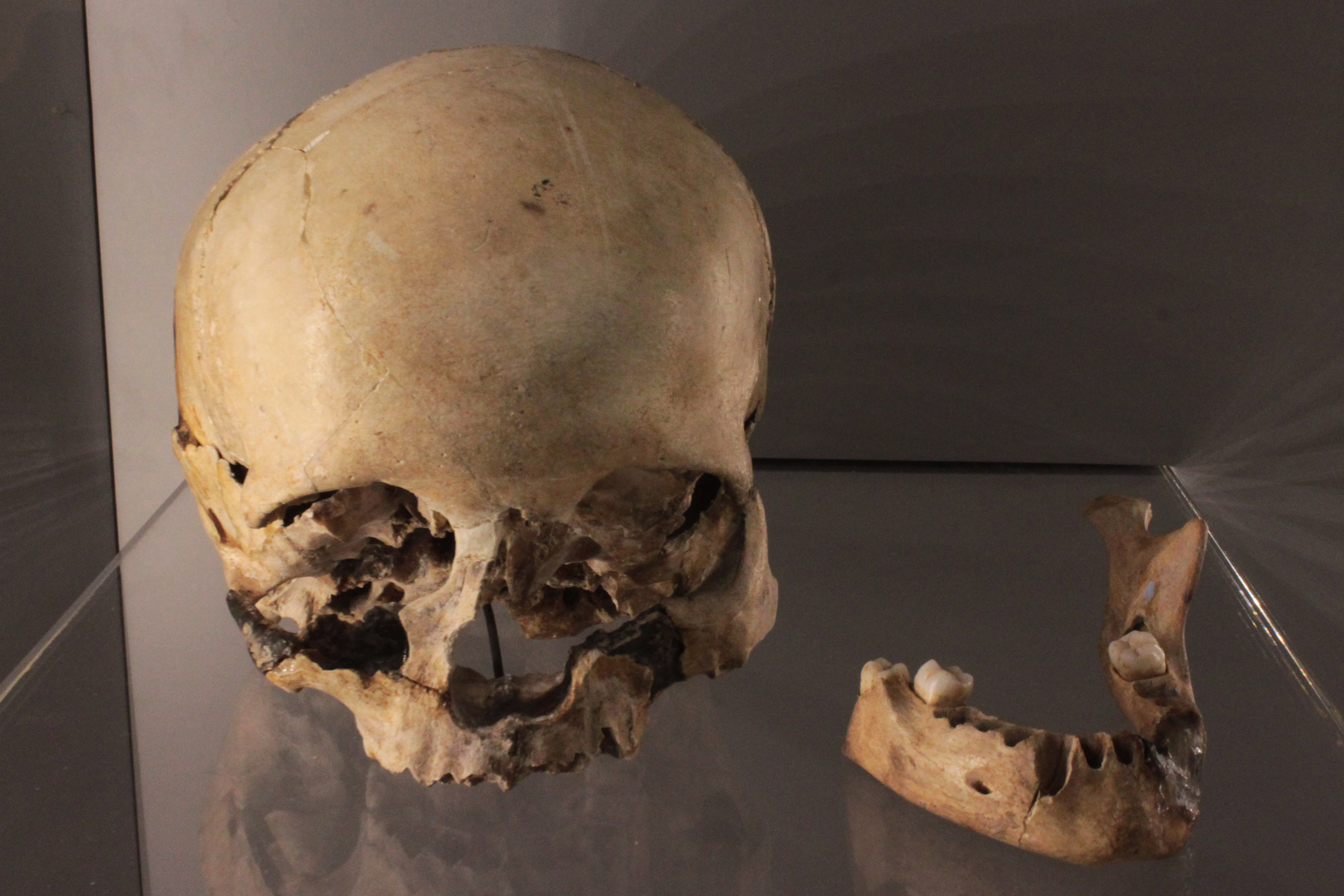 Cráneo humano localizado en estratos del paleolítico superior de la Cova del Parpalló de Gandía (Comunidad valenciana) Fondos del Museo de Prehistoria de Valencia, Comunidad valenciana, España.